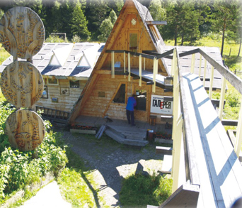 Картинная галерея имени В.Ю Пламеневского